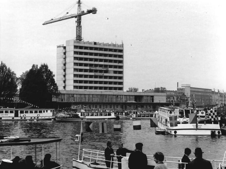 Zentralbild-Schulze 5.5.68 Potsdam, Reger Betrieb herrschte am Wochenende an den Anlegekais der Weißen Flotte. Zahlreiche Potsdamer und Gäste der Stadt nutzten das schöne Wetter zu einer Dampferfahrt auf den Gewässern der Havel nach Werder oder Caputh. Im Hintergrund das im Bau befindliche Interhotel. Textergänzung: Kurz vor dem Beginn der Flottenparade der Weissen Flotte am Sonntag dem 5. Mai 1968